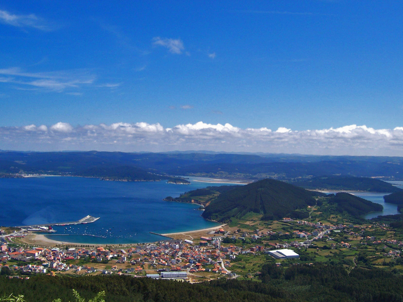 Cariño